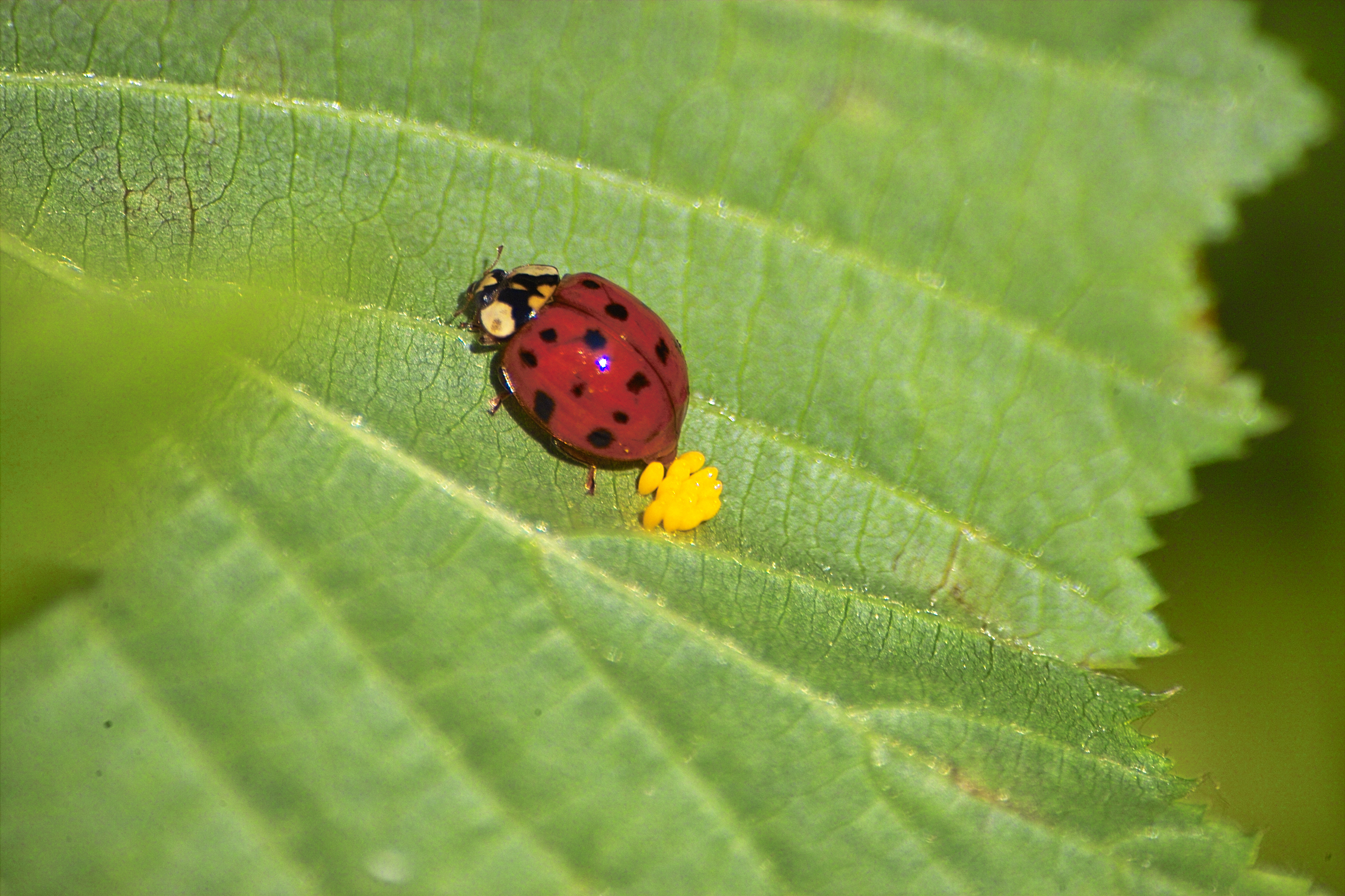 Marienkaefer bei der Eiablage.